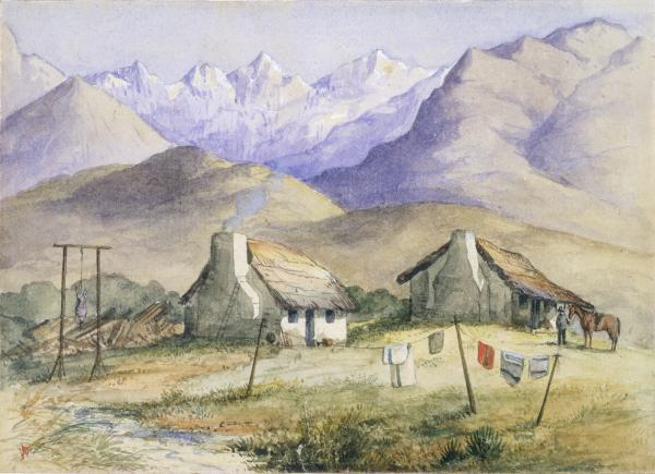 Samuel Butler (novelist) (1835-1902) Homeestad "Mesopotamia"